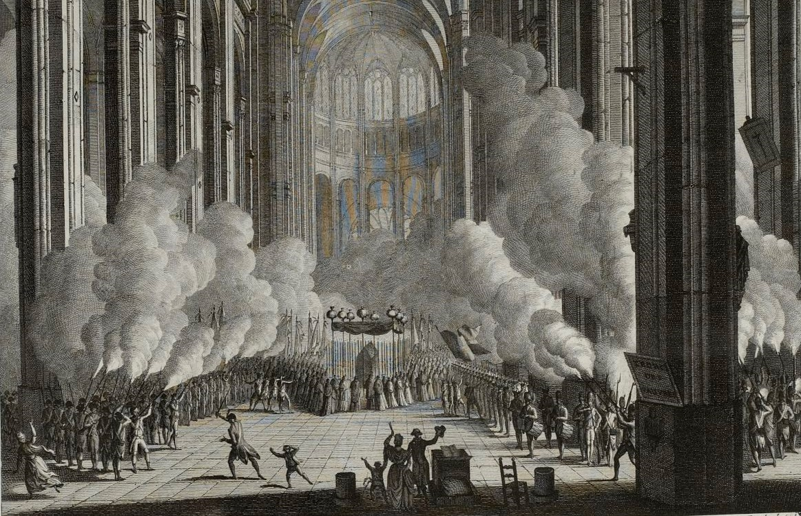 Estampe pompe funèbre de Mirabeau le 4 avril 1791 dans l'église Saint-Eustache à Paris. Conservée au musée de la Révolution française.